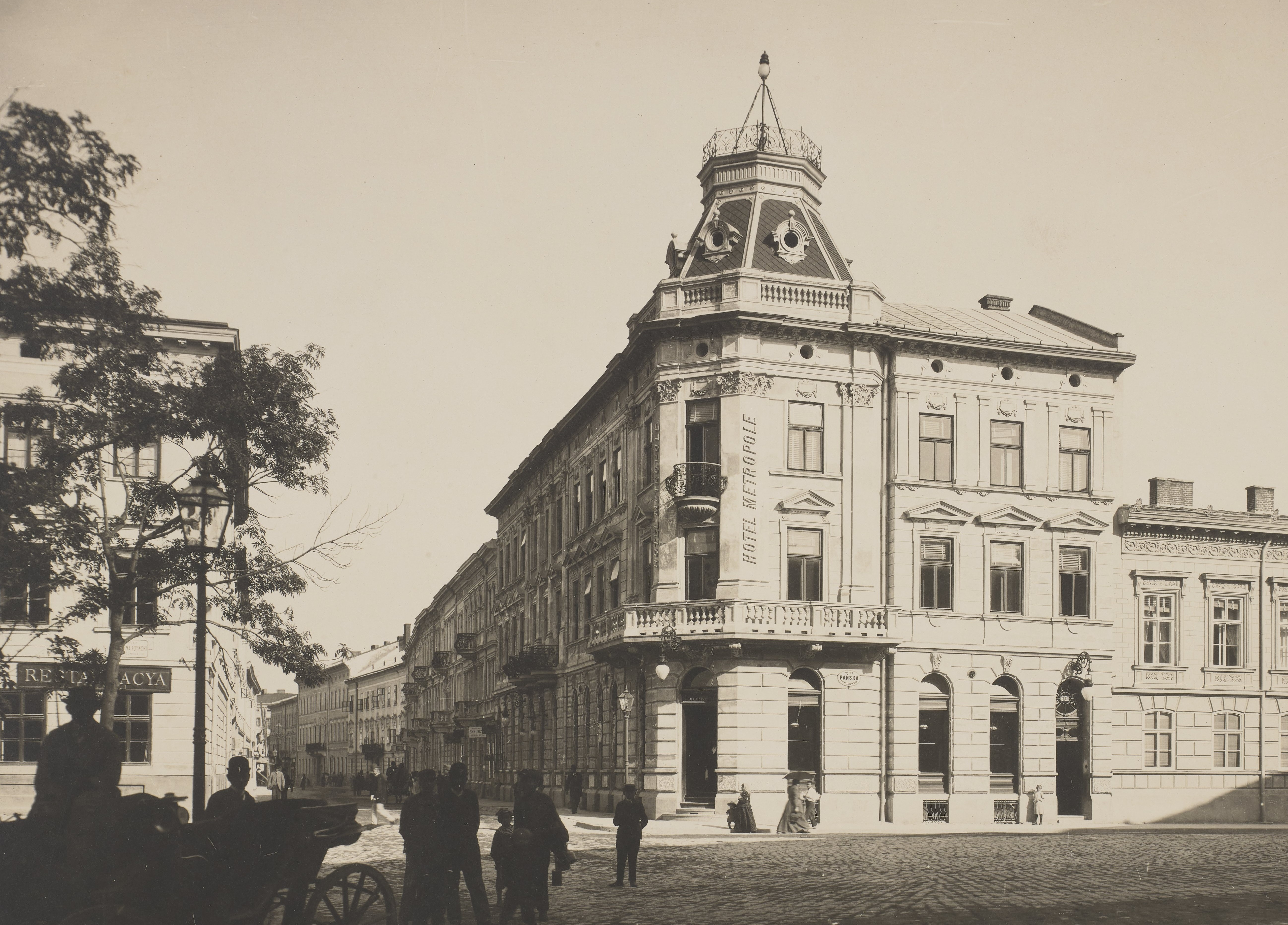 Площа соборна